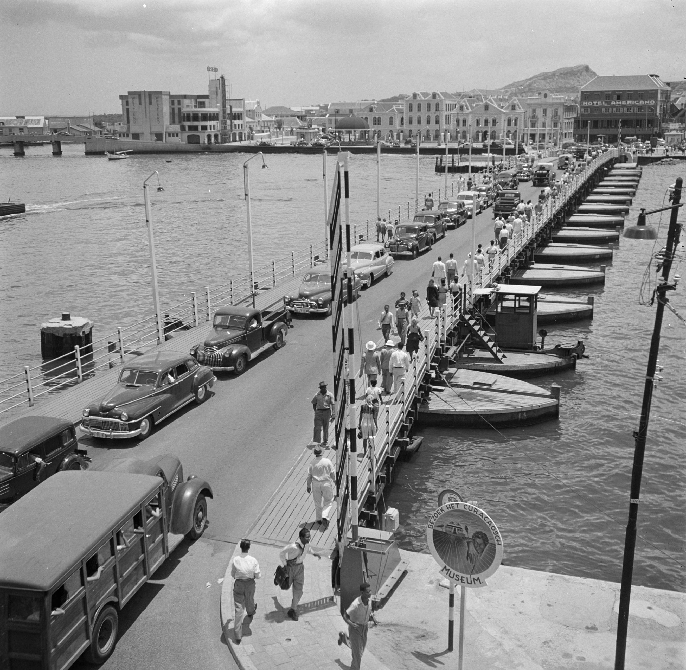 Collectie / Archief : Fotocollectie Van de Poll Reportage / Serie : Reis naar Suriname en de Nederlandse Antillen Beschrijving : De Koningin Emmabrug in Willemstad op Curaçao aan de Pundazijde Datum : 1947 Locatie : Curaçao, Willemstad Trefwoorden : auto's, autobussen, bruggen Instellingsnaam : Emmabrug Fotograaf : Poll, Willem van de, [onbekend] Auteursrechthebbende : Nationaal Archief Materiaalsoort : Negatief (zwart/wit) Nummer archiefinventaris : bekijk toegang 2.24.14.02 Bestanddeelnummer : 252-7242